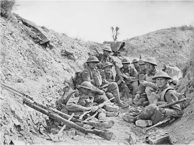 Membres du 24e Bataillon (Victoria) dans une tranchée, attendant la levée du barrage d’artillerie avant l’attaque renouvelée sur Mont St Quentin, France, 1er septembre 1918. [AWM E03138]